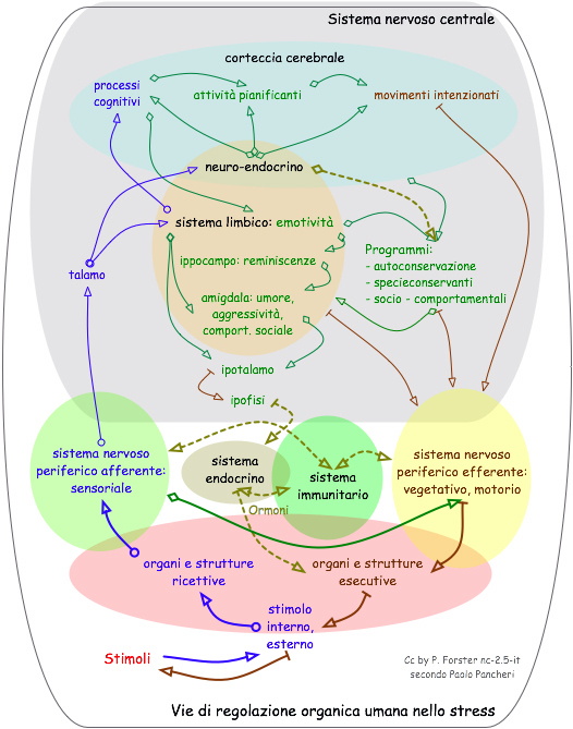 Grafica: Medicina: Stress: Vie di regolazione organica umana nello stress: 1) stimoli, 2) sistemi, 3) organi 4) programmi: autoconservazione, specieconservante, sociocomportamentale; 2) nervoso centrale, periferico, endocrino, immunitario; 3) corteccia cerebrale, neuro-endocrino, limbico, ippocampo, amigdala, ipotalamo, ipofisi